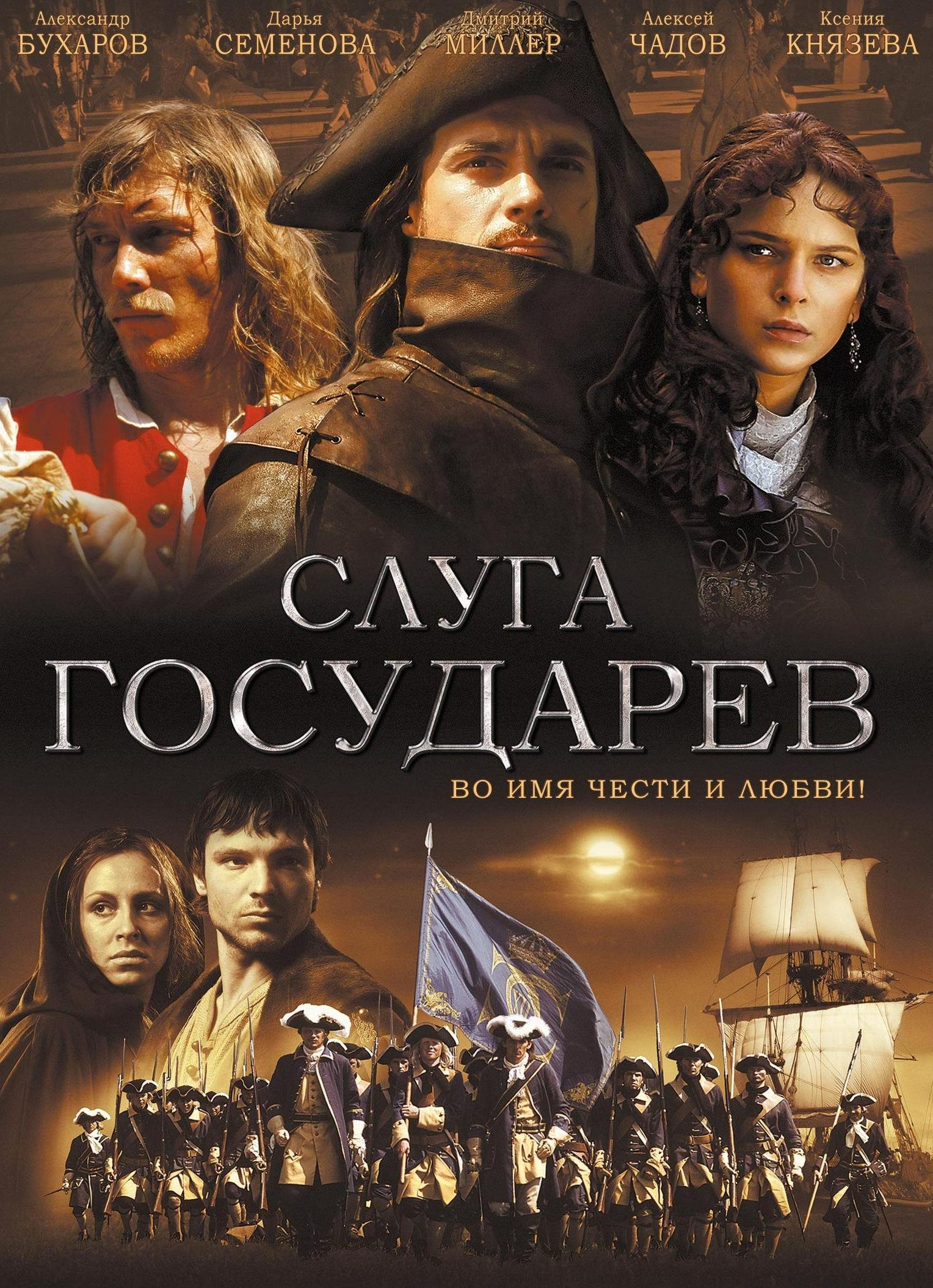 Постер фильма «Слуга государев»